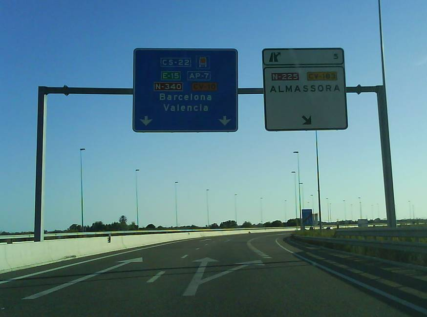 Imagen de la autovía CS-22 a la altura de la salida hacía Almazora.